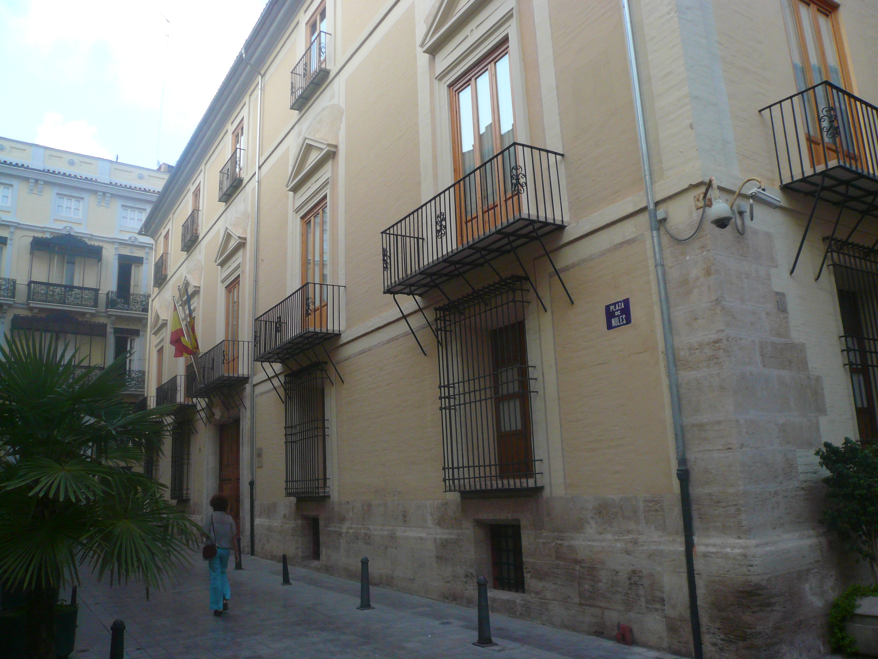 Palau dels Català de Valeriola (València)